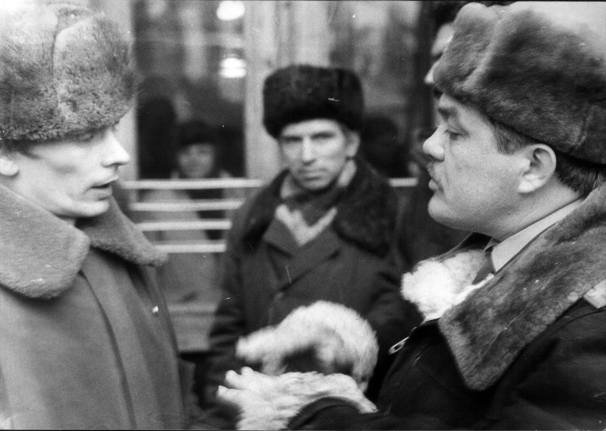 Фото